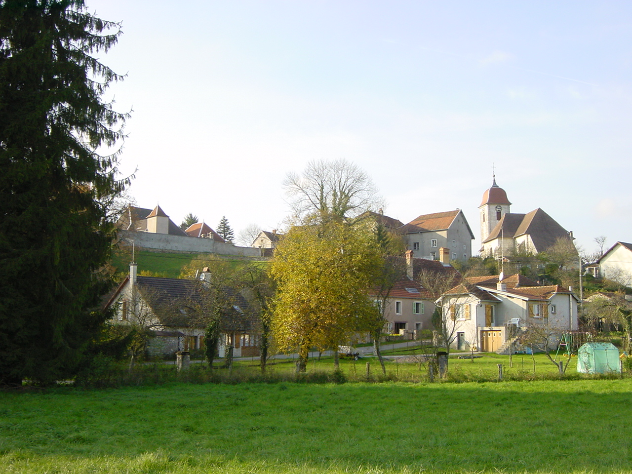 Vue générale du village depuis la route de Tressandans.